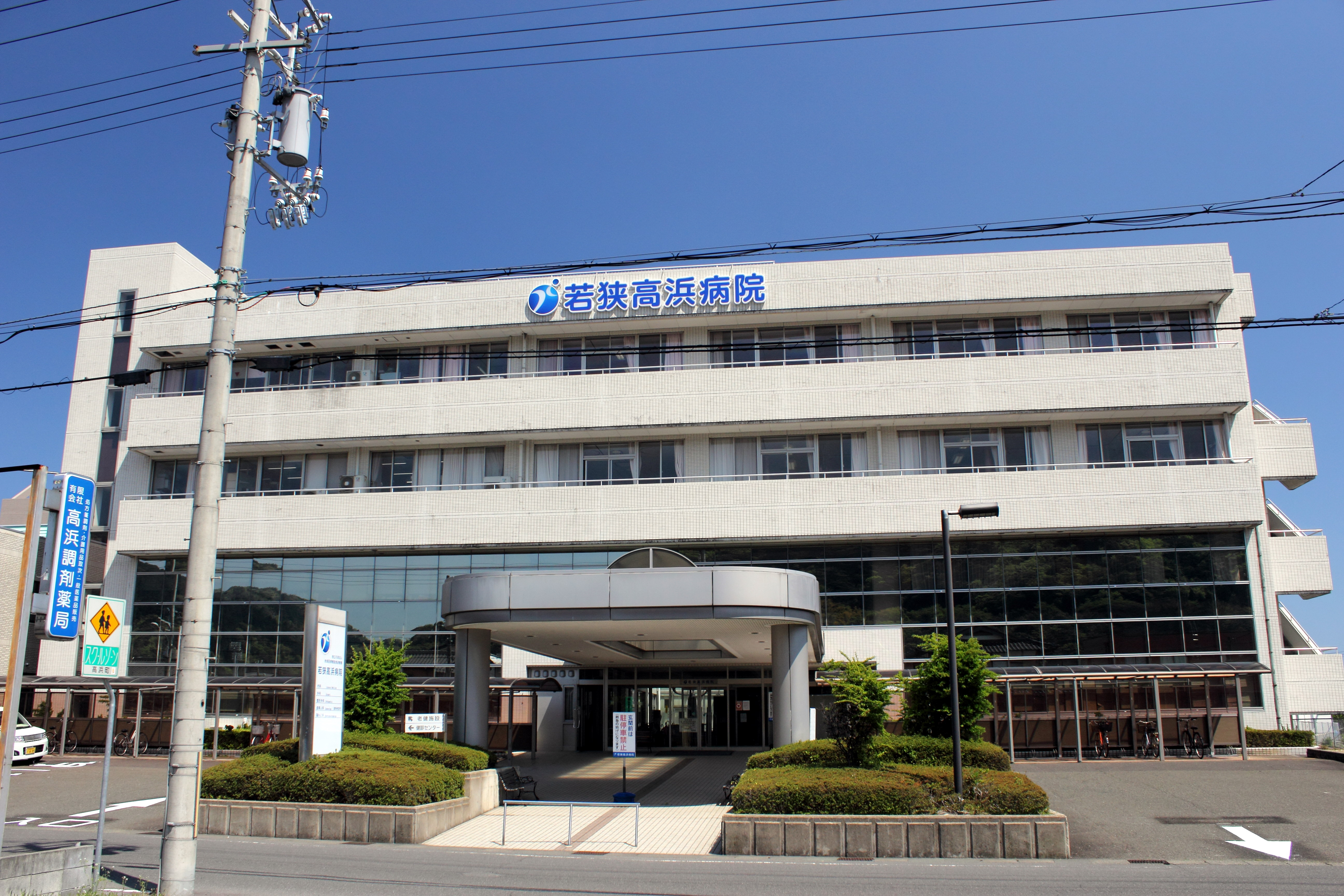 独立行政法人地域医療機能推進機構 若狭高浜病院